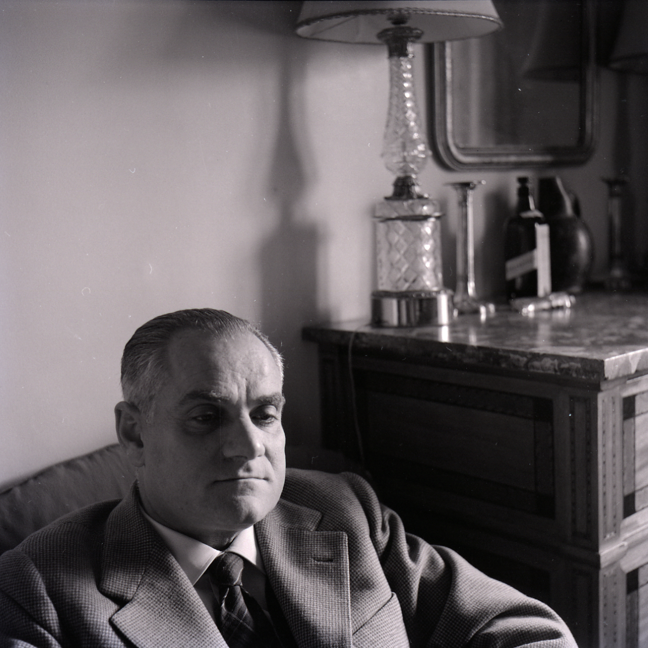 Servizio fotografico : Italia, 1982 / Paolo Monti. - Buste: 9, Fototipi: 9 : Negativo b/n, gelatina bromuro d'argento/ pellicola ; 6x6. - ((Serie costituita da 5 buste di carta, tenute insieme da una graffetta, identificate con i nn.: R4474, R4475, R4476, R4477, R4478 . - Sulla busta R4474: "Roiter". - Faldone di Paolo Monti: V Appunti (1959-1993), presso Archivio Paolo Monti. - Fonte